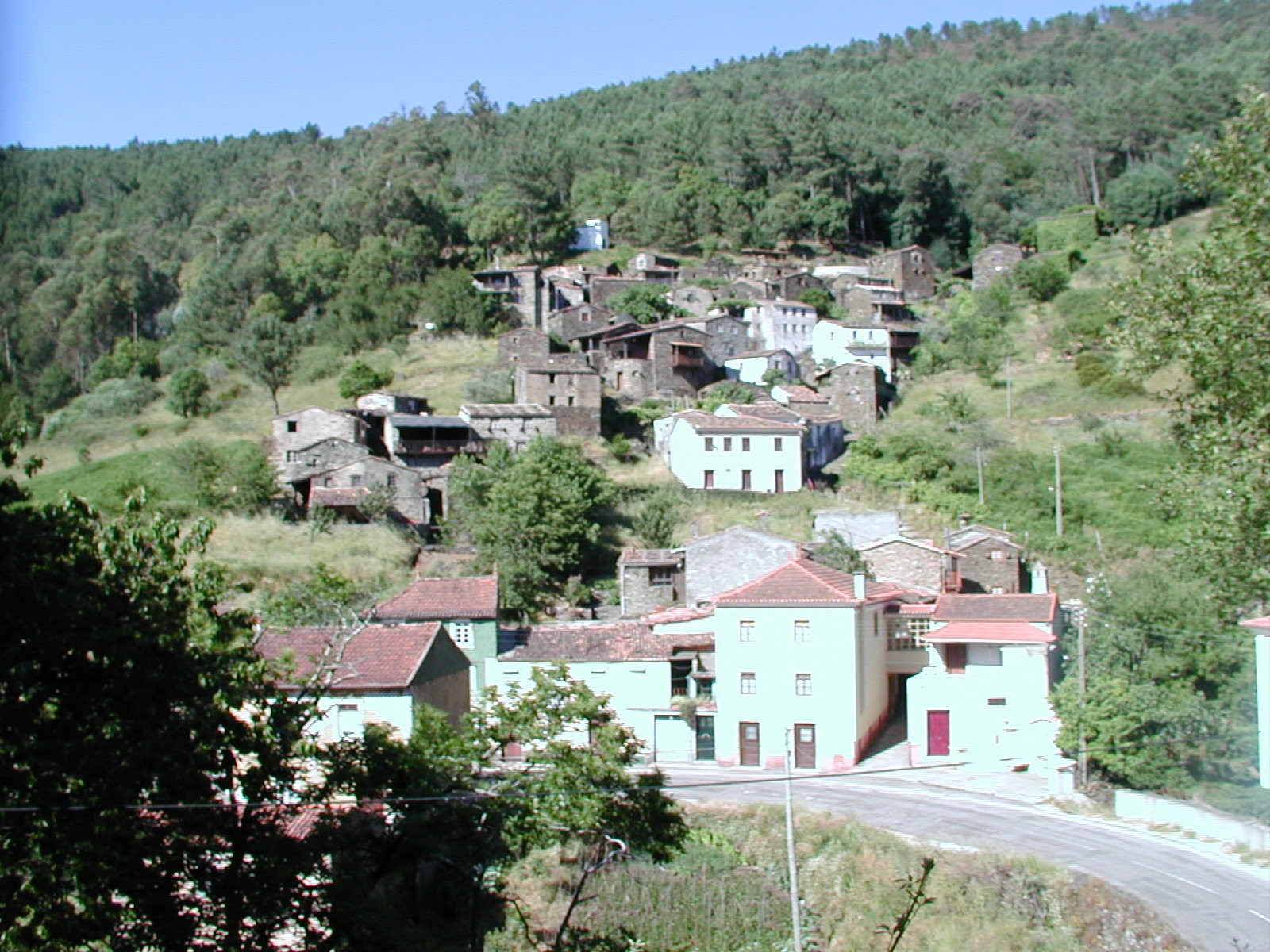 Aldeia de Candal